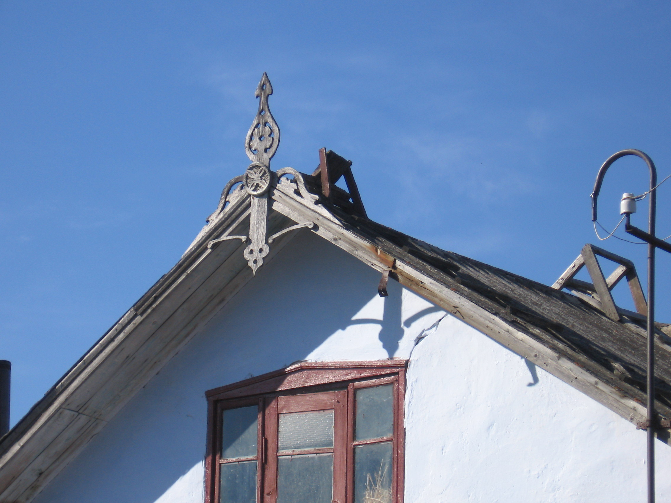 Причілкова прикраса.